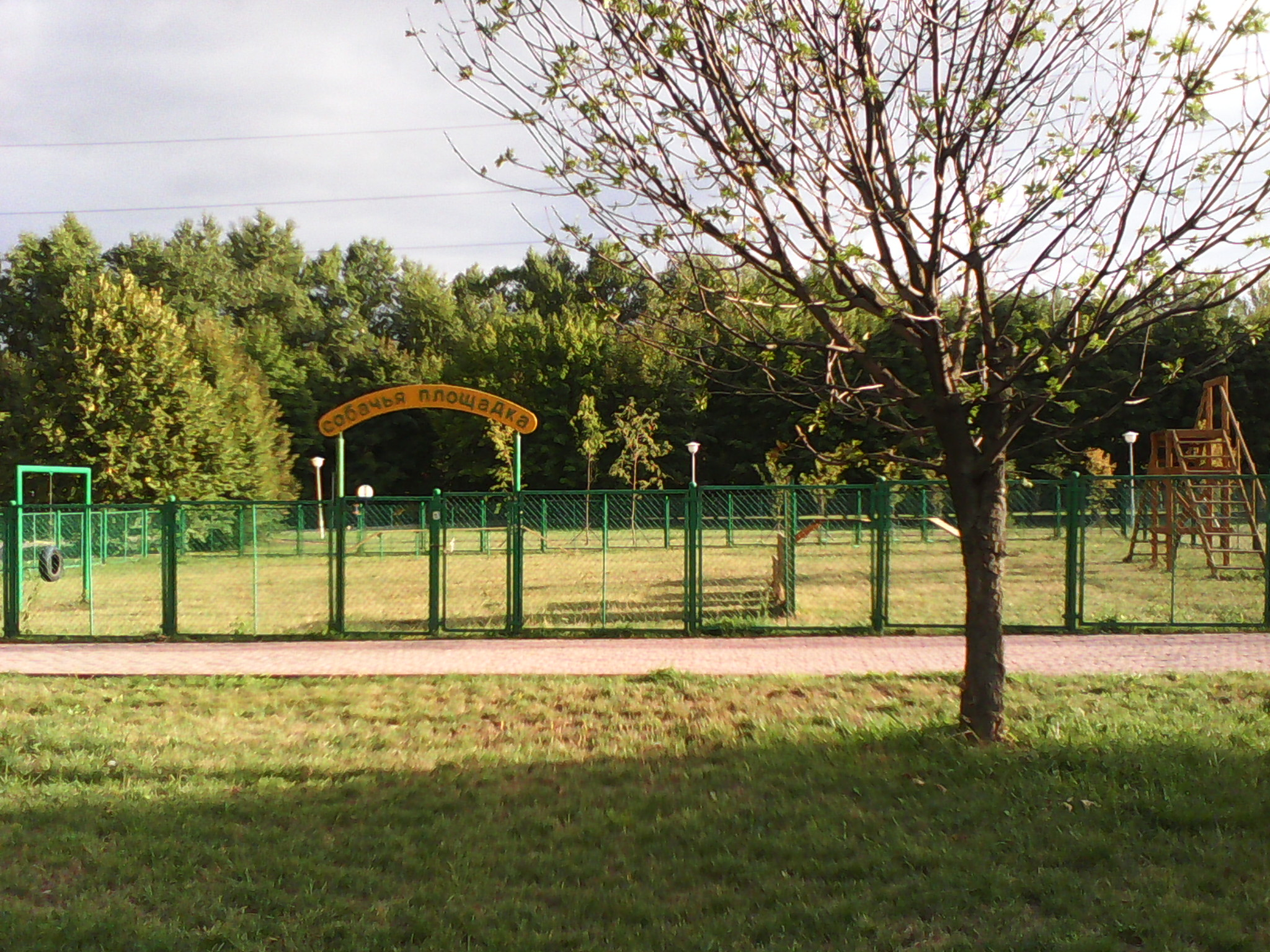 Собачья площадка в Москве в районе Москворечье-Сабурово